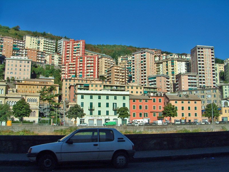 La perifería de Génova